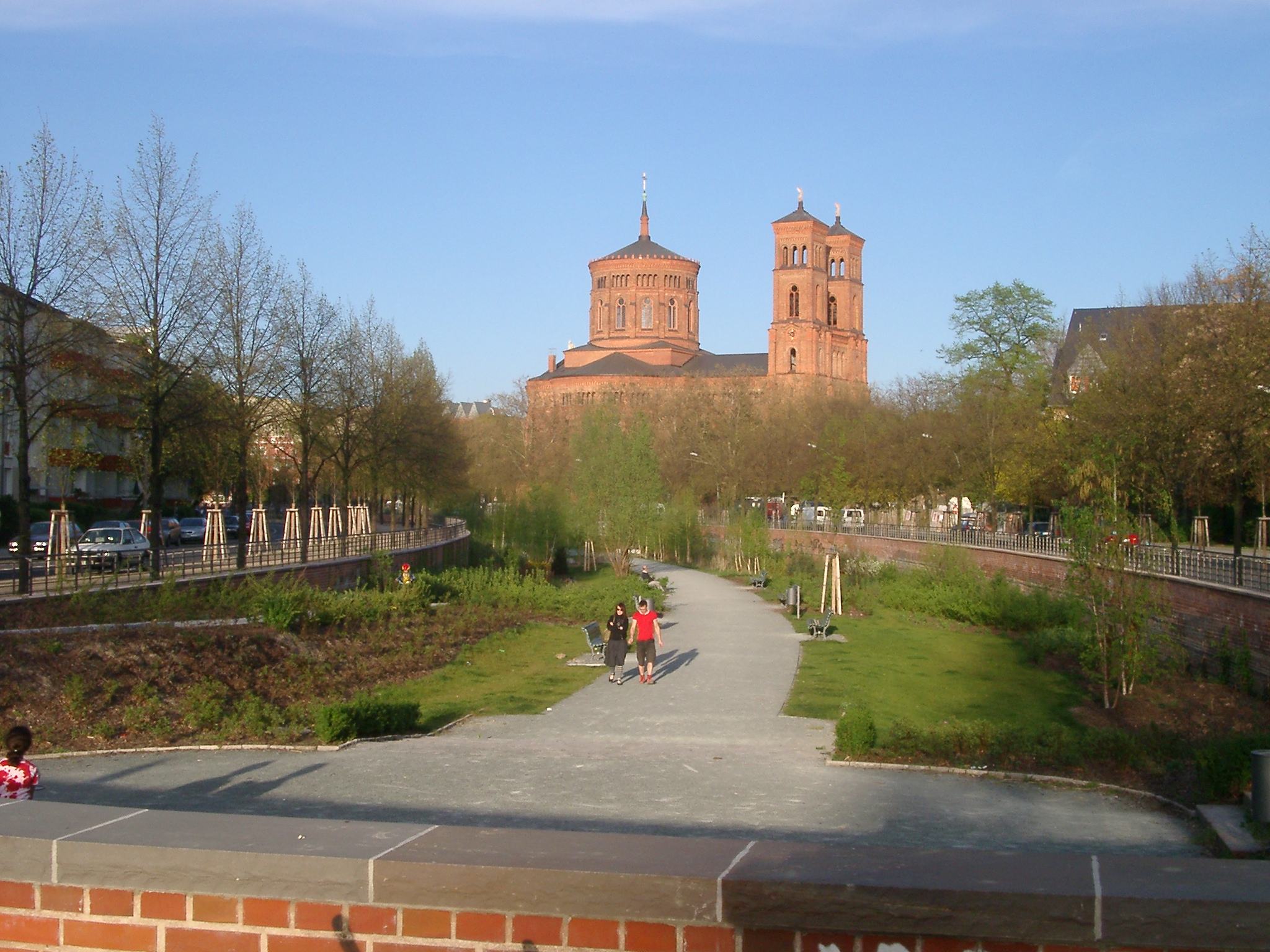 St. Thomas-Kirche in Berlin-Kreuzberg